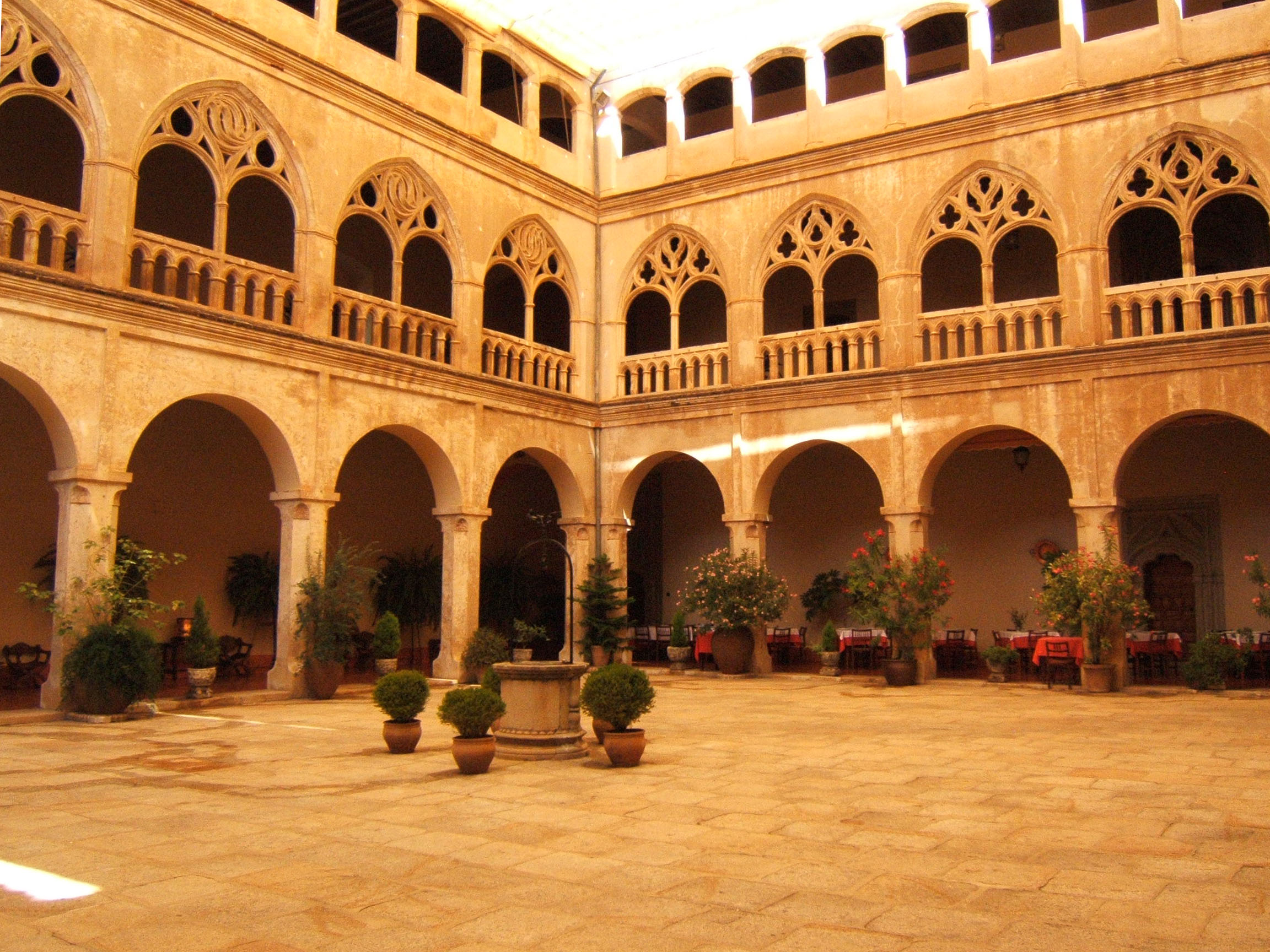 Denominado también claustro de la enfermería, actualmente forma parte de la hospedería del monasterio.